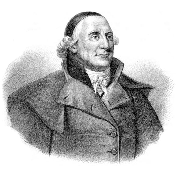 Peter Hernqvist (1726-1808)